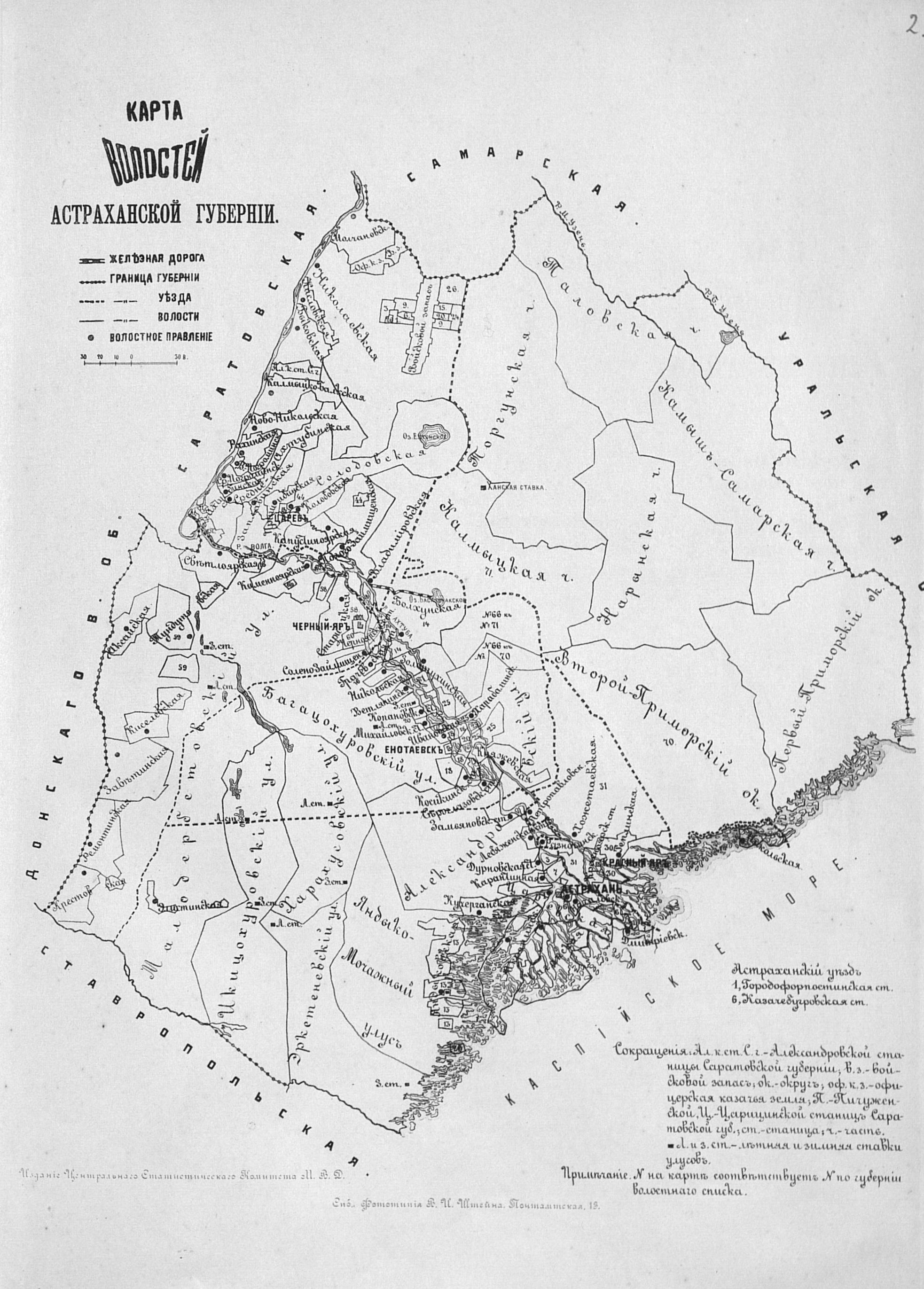 Карта волостей Астраханской губернии